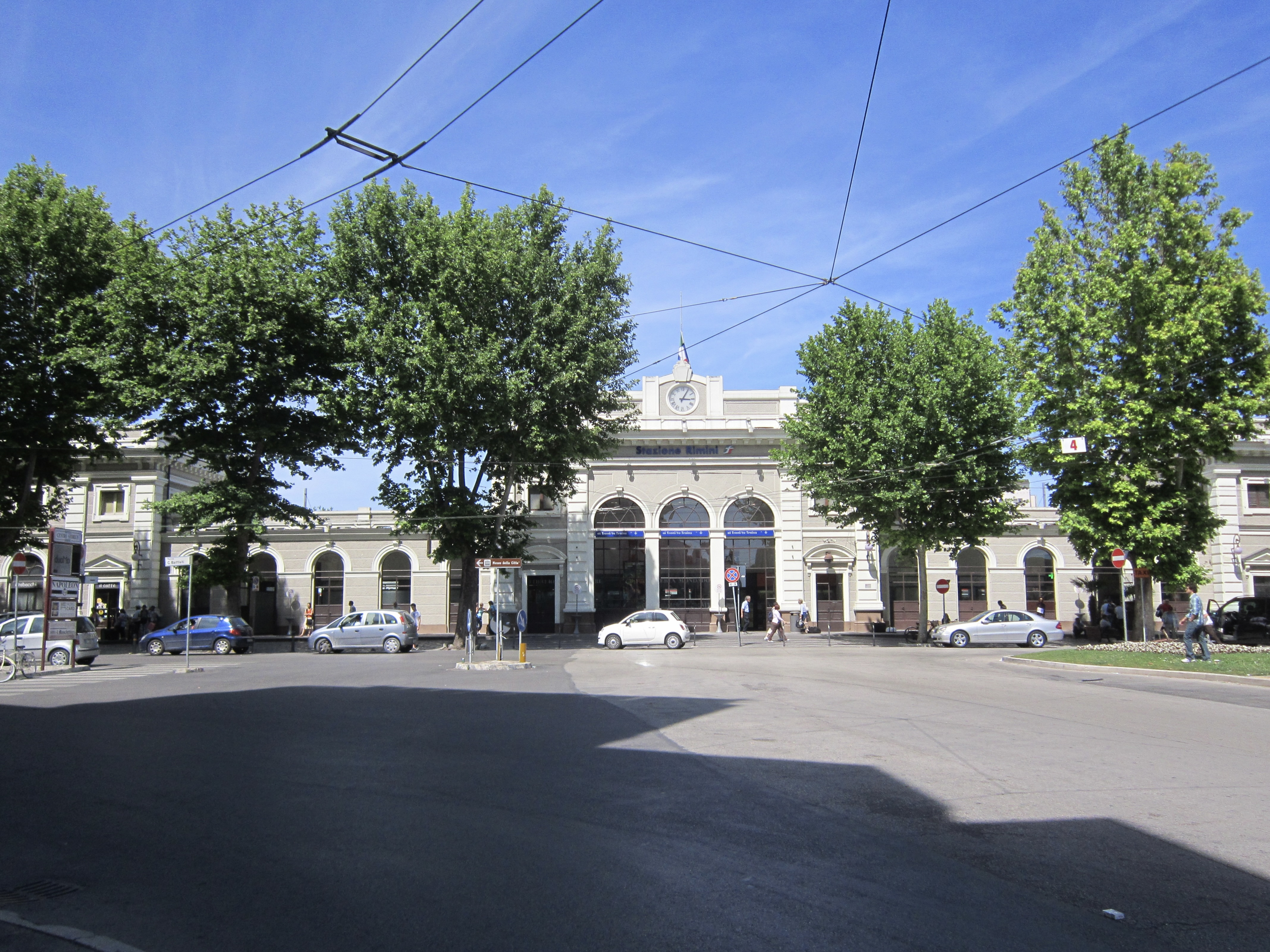 La stazione ferroviaria di Rimini nel maggio 2011.